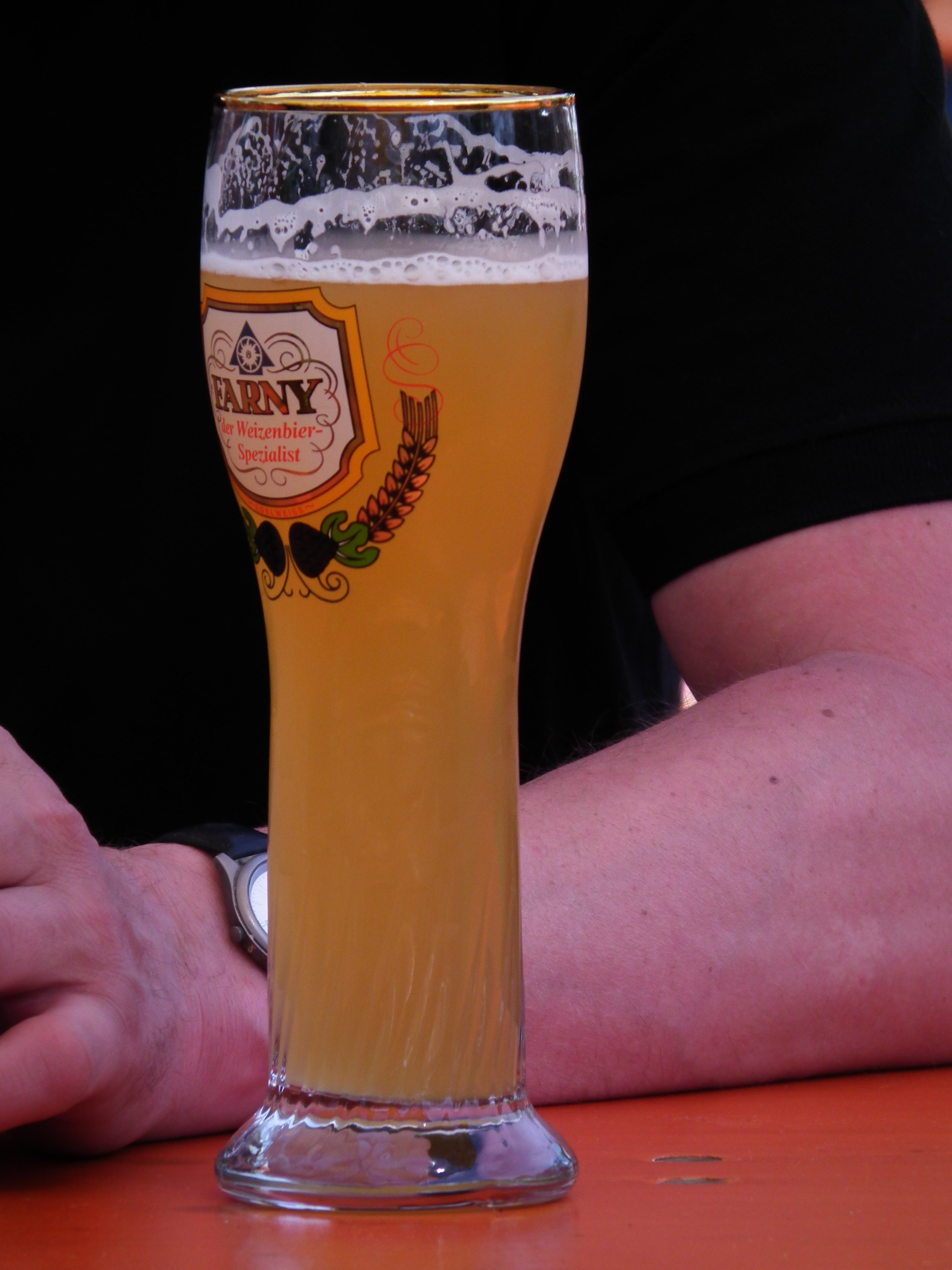 Glas Weißbier, fotografiert in Deutschland)